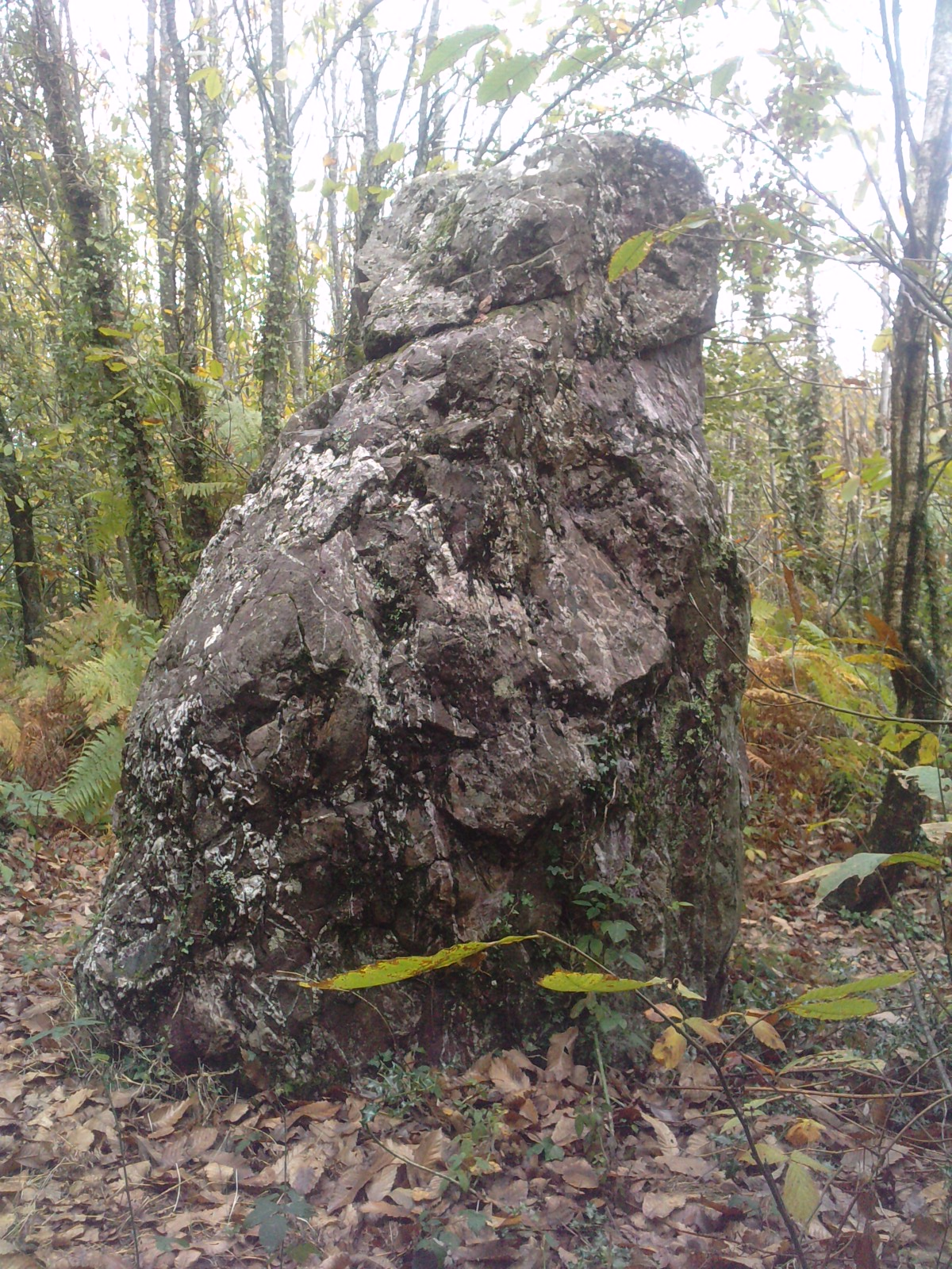 Menhir de la Pierre du Hochu, Forêt de Domnèche (Classé, 1928)